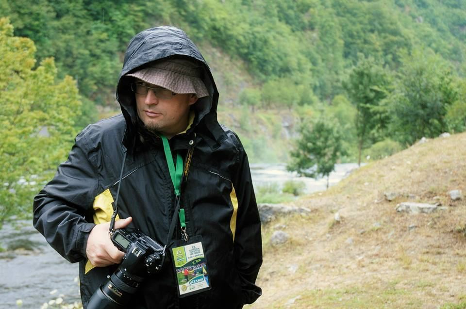 Бранислав Лукић Лука (Тузла 31. март 1970.) Мултимедијални уметник, Босна и Херцеговина.